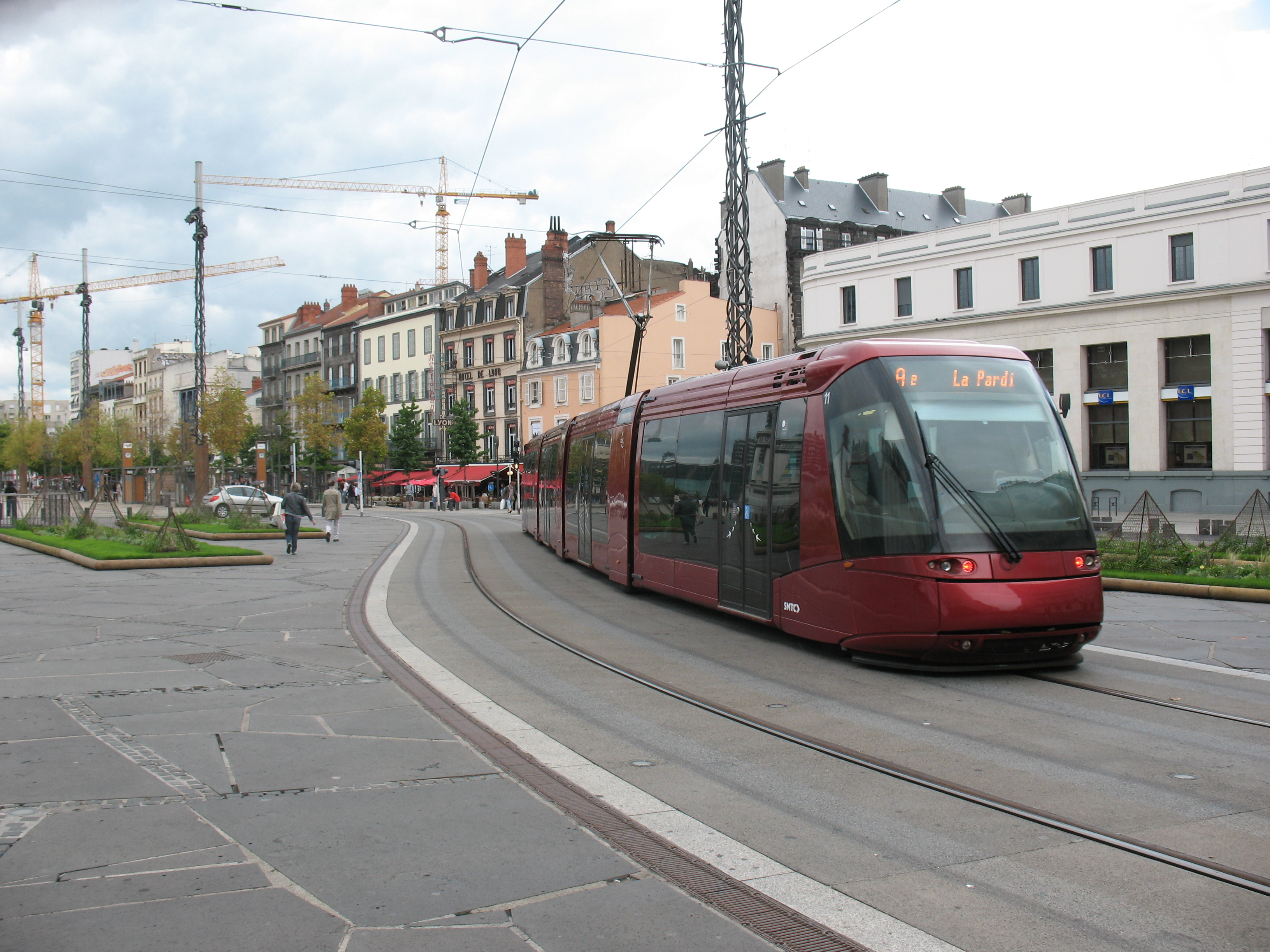 place jaude